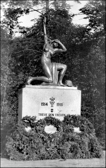 Artillerie-Denkmal in Schwerin